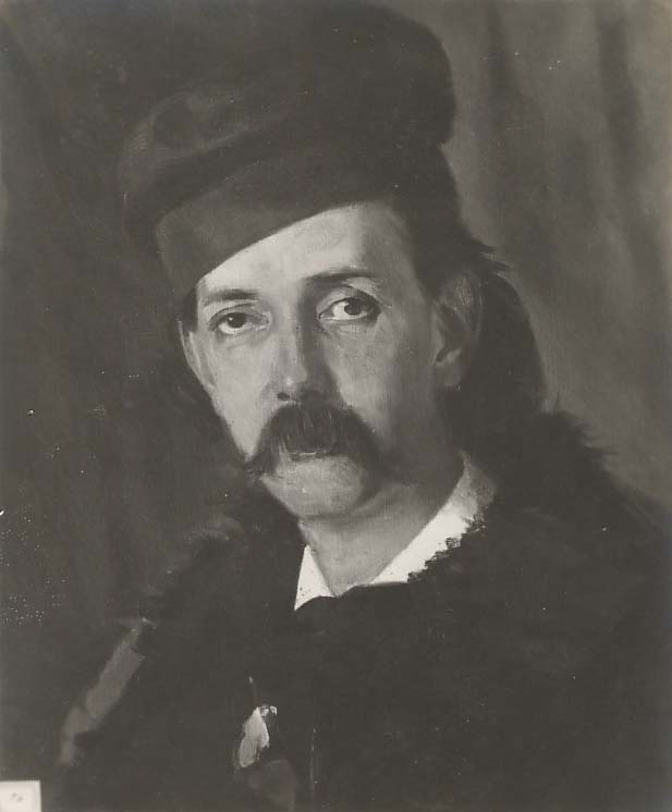 Fotografia in bianco e nero di un ritratto ad olio di Mario Rapisardi eseguito da Antonino Gandolfo. La foto è di mia proprietà